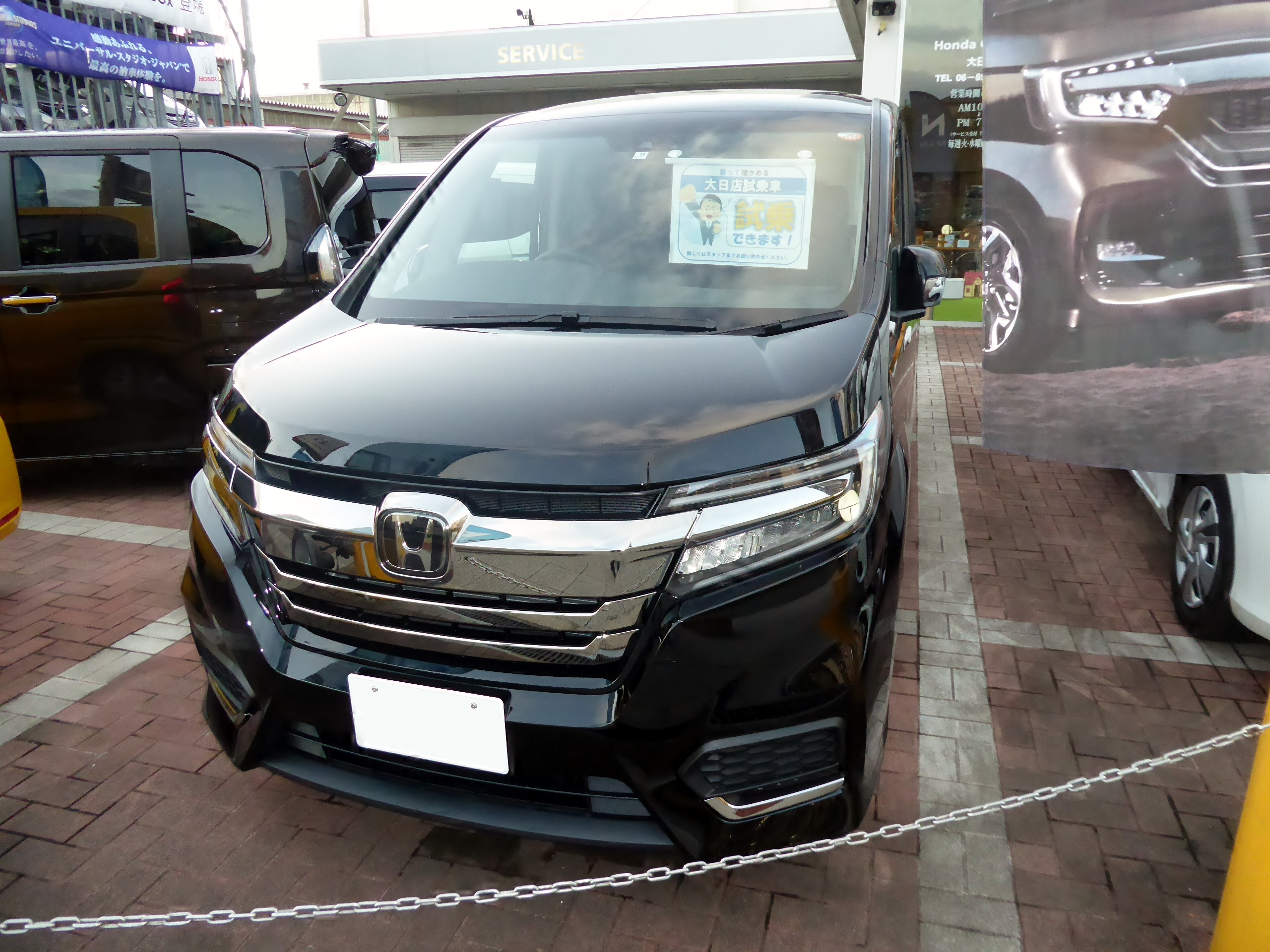 DBA-RP3型ホンダ・ステップワゴンスパーダHonda SENSINGを撮影。